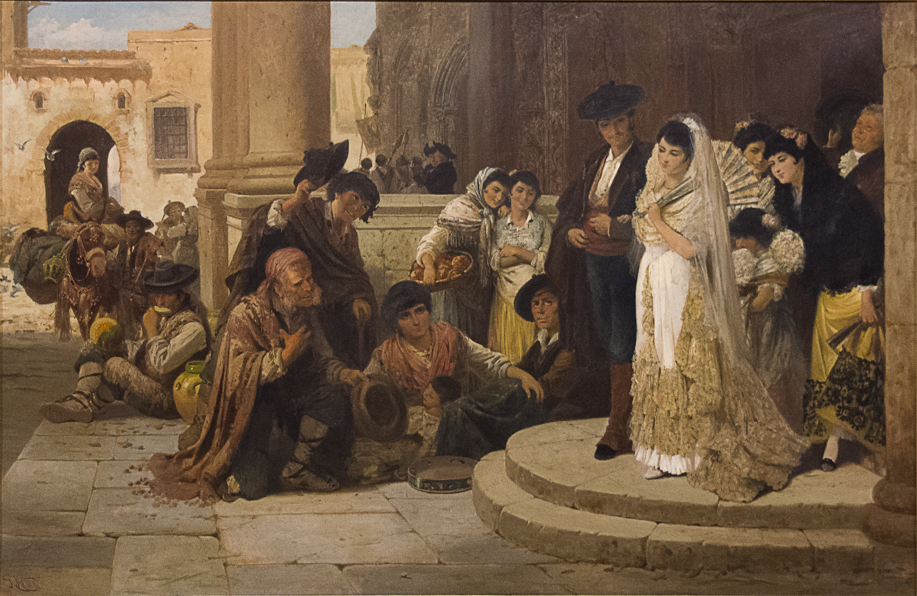 La boda española. Óleo sobre lienzo 97,5 x 144 cm.